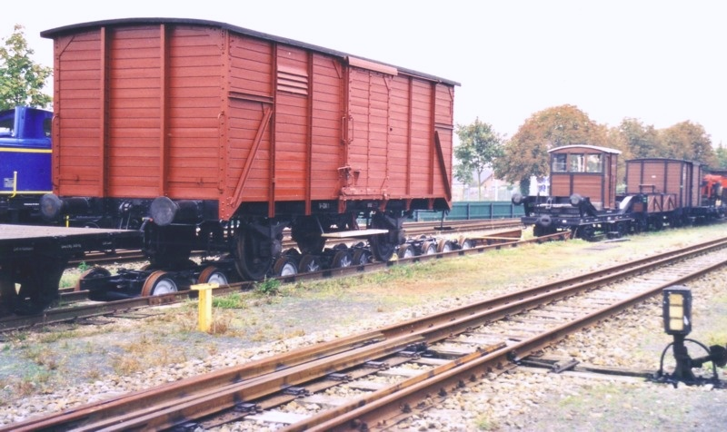 Die Rollbockanlage der Museumseisenbahn Bruchhausen-Vilsen–Asendorf in Bruchhausen-Vilsen